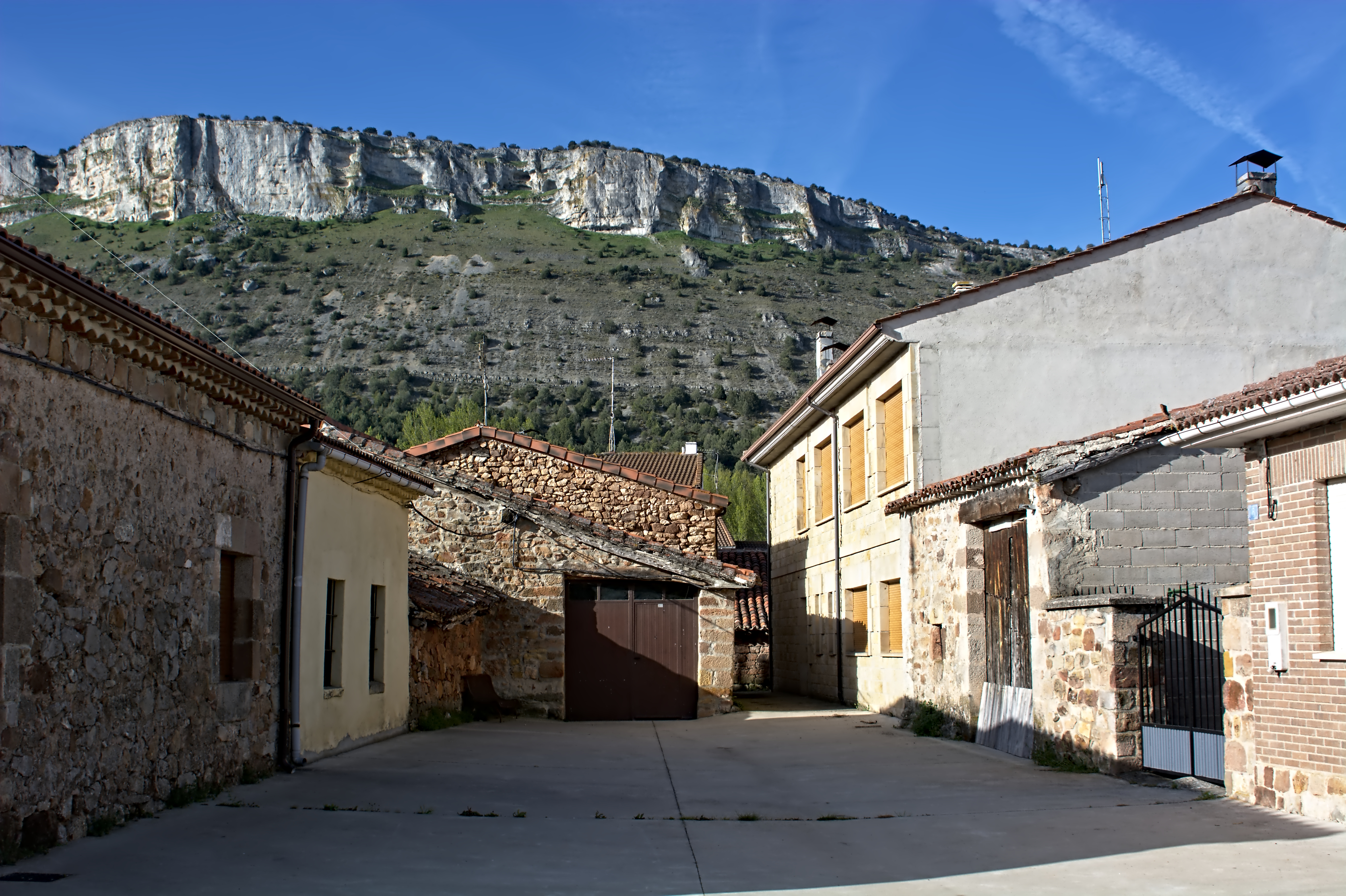 Cascajares de la Sierra - Calle